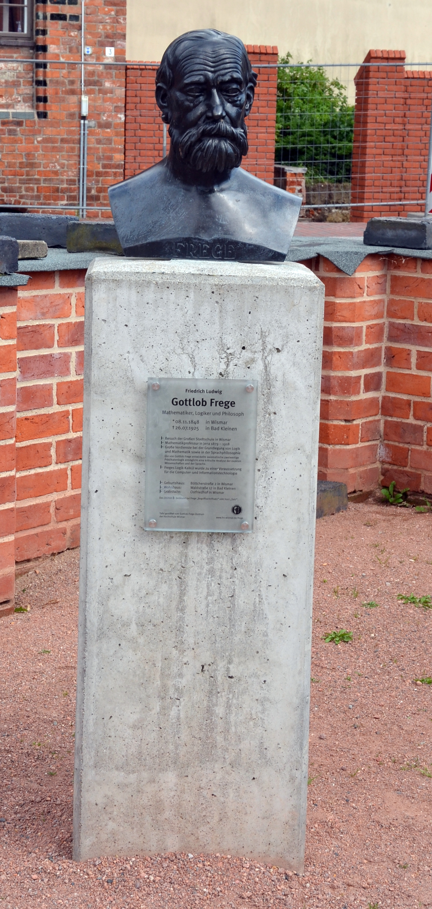 Marienkirche (Wismar). Bronzebüste des Mathematikers Gottlob Frege (1848-1925) von Karl-Heinz Appelt (1940-2013). Weitere Abgüsse in den Philosophischen Seminaren der Universitäten Jena (seit 1998) und Bonn (seit 2000).